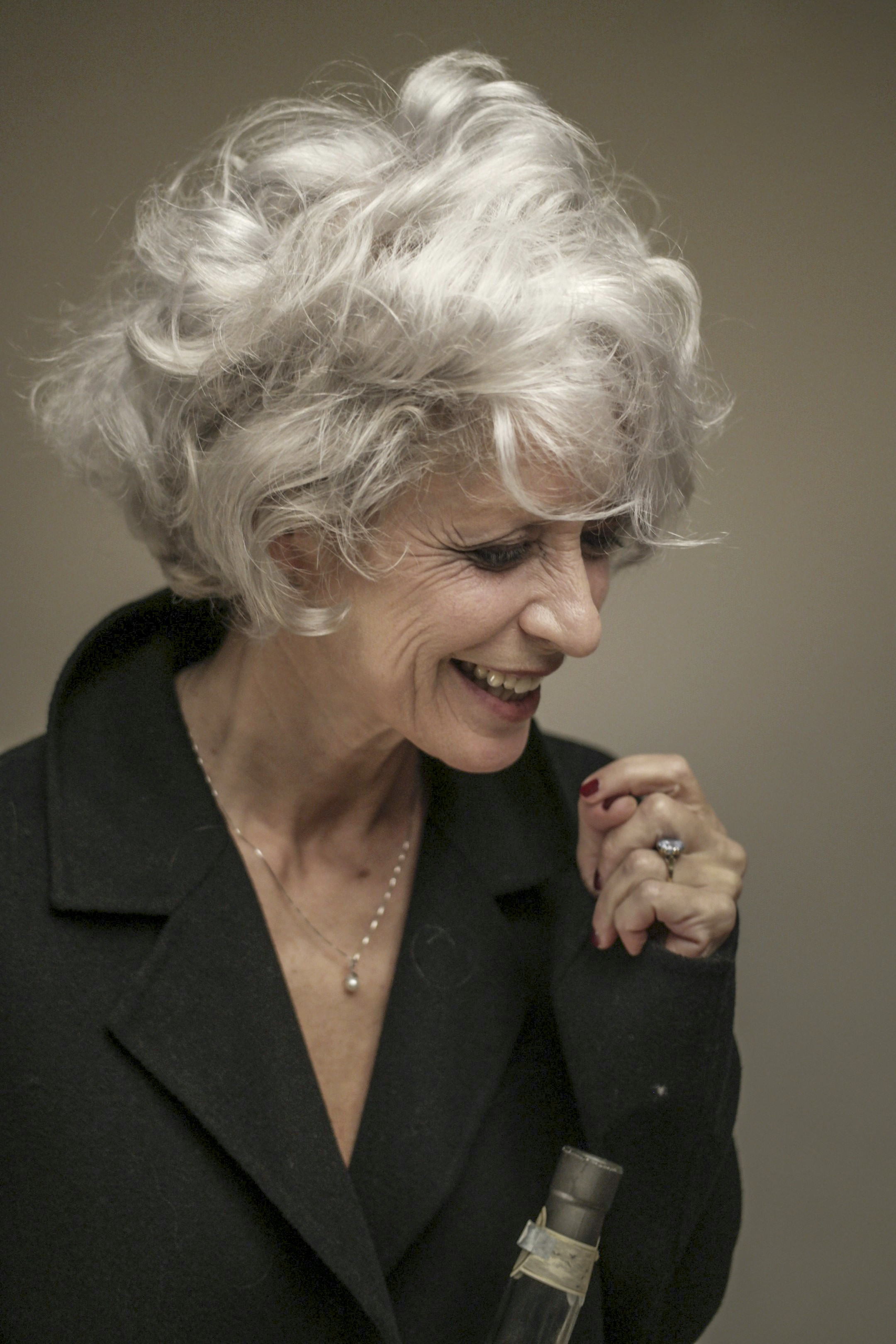 Paola Sambo in un ritratto di Giacomo Spaconi pubblicato su FLICKR nel 2018